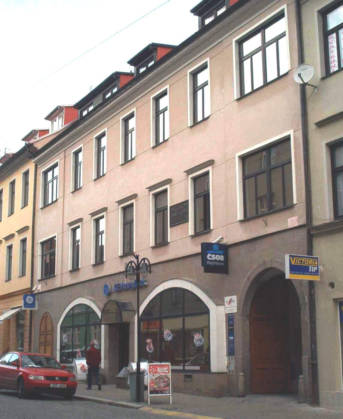 Tábor-rodný dům ing.arch.M.Petříkové-Pavlíkové, Palackého 357/5.